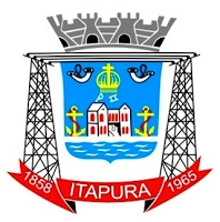 Brasão de armas do município de Itapura - SP - Brasil.